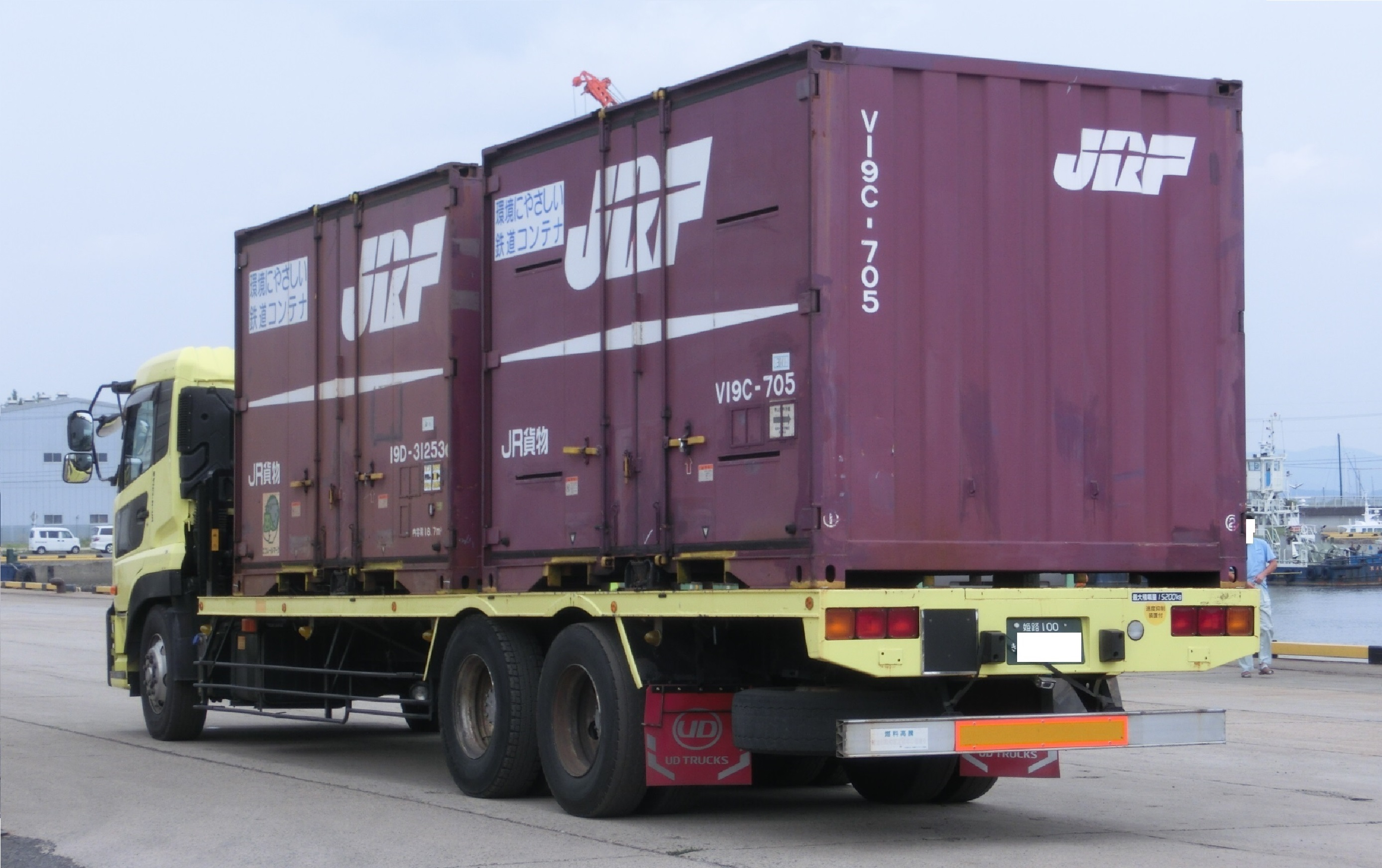 三度目の移転で広大な敷地と、完全に隔離され夜間留置の安全性が高まった岡山市東区にある 「 岡山新港高島埠頭 」 で、JR貨物所有の12ft形コンテナを船舶代行輸送する風景。 停泊している内航船で、北九州港へ一日一往復していた。 内航船の横に設置されたクレーン車で吊り作業を行い、コンテナの敷地内の移動は、二台の10t級フォークリフトで行う。 ＝＝＝＝＝＝＝＝【 総 括 】＝＝＝＝＝＝＝＝ 2018年 ( 平成30年 ) 7月5日 ( 木 ) から岡山県や広島県及び、山口県内の各地で発生した 「 平成３０年７月豪雨 」 の影響により、三県内の山陽本線で複数個所において、線路喪失を含む大規模な輸送障害が三ヶ月以上にわたり発生した。 これに伴い、元々岡山県内の拠点となっている 「 JR貨物岡山(タ) 」 が今回の輸送障害区間では、事実上の東側の終着点駅となり、この影響で福山通運の30ftコンテナのみを一列車貸切っている 「 福山レールエクスプレス号 」 積載の全コンテナを始め、全国からの九州地区向けの大口宅配や冷凍などで大量に扱われていた20ft及び、30ftの大型コンテナを全て 「 岡山(タ) 」 で臨時に取り扱うこととなった。 「 岡山(タ) 」 ではこれらの大型コンテナを最優先輸送させる為に、広島や山口へのトラック代行輸送する臨時便が一気に集中し、荷役能力の逼迫となってしまった。 また岡山県内の水島臨海鉄道の拠点コンテナ駅である 「 東水島駅 」 への関東からの定期列車は、本来はこの 「 岡山(タ) 」 で一部のコンテナの取り卸と、機関車を付け替えてから 「 東水島駅 」 へ中継輸送していたので、この関東便に関してはさほど問題は無かったが、 通常の 「 東水島駅 」 から 「 岡山(タ) 」 で中継して九州向けのルートが絶たれてしまった。 この打開策として、 「 東水島駅 」 ～ 九州向けの入出荷ルートと、近隣の 「 姫路貨物駅 」 や 「 神戸(タ) 」 での置き去り気味で滞留し続ける12ft形5tコンテナ （ 私有コンテナを除く ） の輸送を確保するために、船舶を利用した 「 災害時の鉄道代行輸送 」 ルートとして、中国地区としては初めてとなる福岡県 「 北九州港 」 までの船舶輸送が始まった。 担当港は、「 東水島駅 」 の最寄港となる 「 水島港 」 を利用すれば一番効率もよく、また駅から港までの輸送費も抑えられるが、当初予想されていた約四ヶ月もの期間を一貫して使用できる用地の確保する見通しがたたず、緊急暫定的処置として、初日の7月18日 ～ 約一週間程度の短期間を、地元の水島港 （ 実地港区は不明 ） で取り扱うこととなった。 7月下旬からは、荷役埠頭敷地や荷役設備の受け入れ準備が整った、東水島駅から陸路で約30キロ離れた岡山市南区の 「 岡山港福島埠頭 (ゲートも無く出入り自由地区) 」 で、8月31日までの期限付きで着地港の変更無く 「 水島港 」 から引き継がれてた。 更に9月1日からは、積み残しや陸路の輸送待ちで安全に夜間でも留置できる設備の確保として、荷役埠頭がフェンスで完全に区画管理されて専用使用できる、陸路で約三キロ離れた河口対岸の岡山市東区にある 「 岡山新港高島埠頭 」 へ、再度移転して一連の代行輸送が最終日となる、9月28日の下り便の出航まで続いていた。